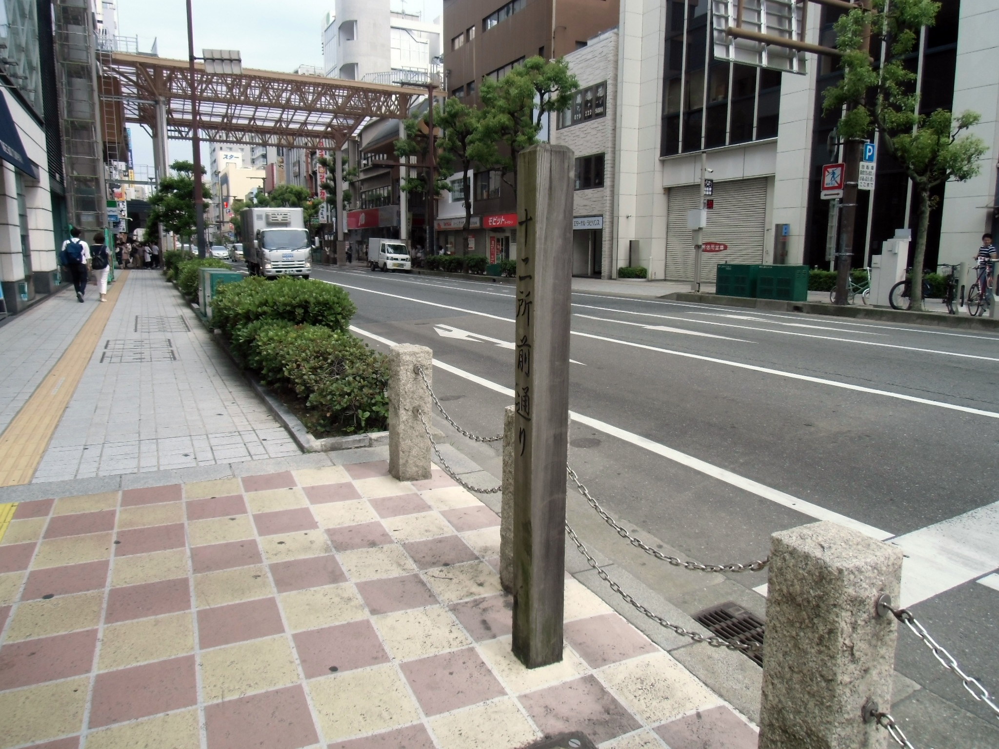 姫路市白銀交差点にある姫路市道十二所前線の道標